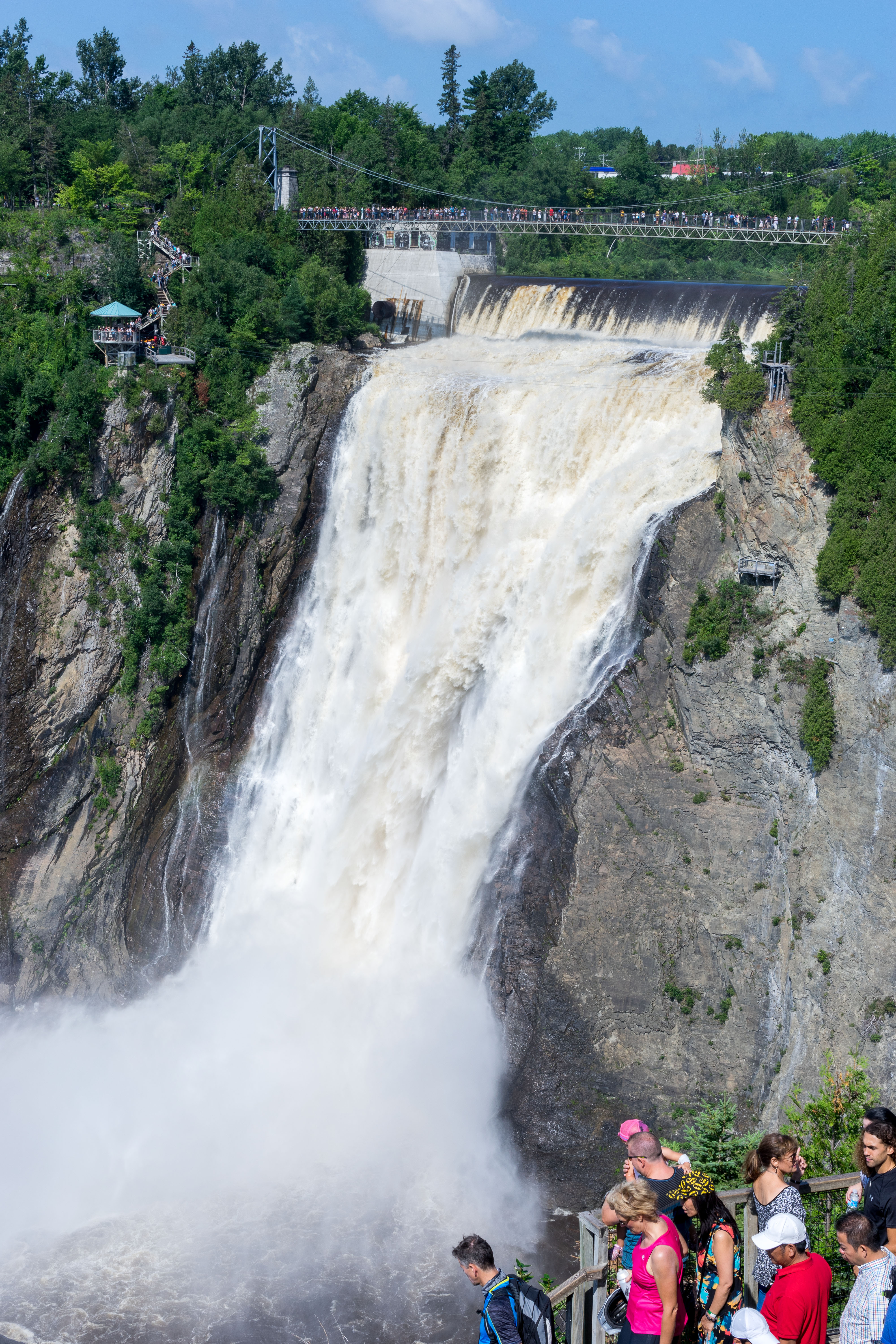 Quebec - Chutes Montmorency